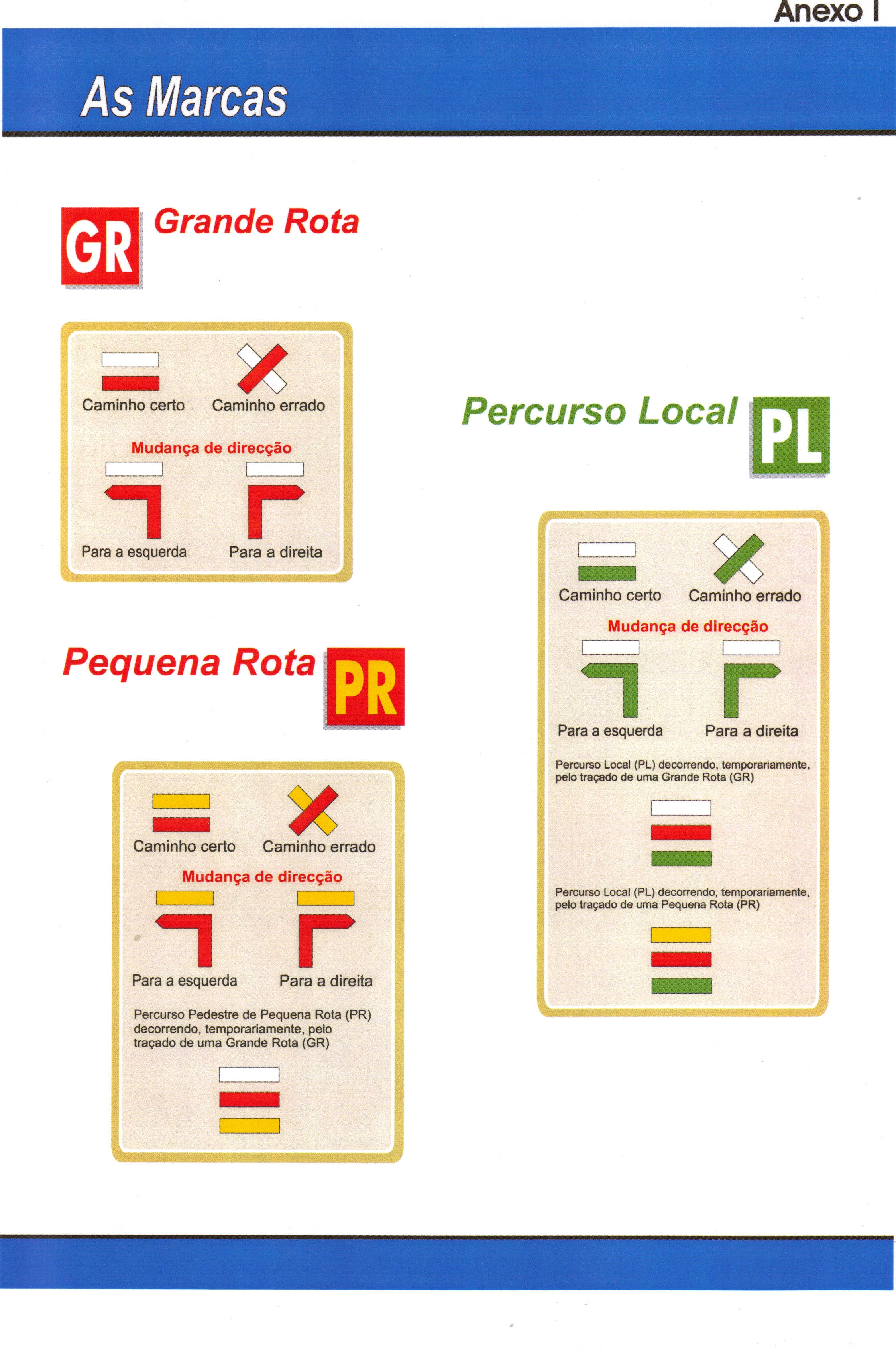 Marcas Homologadas pela FCMP para GR, PR e PL